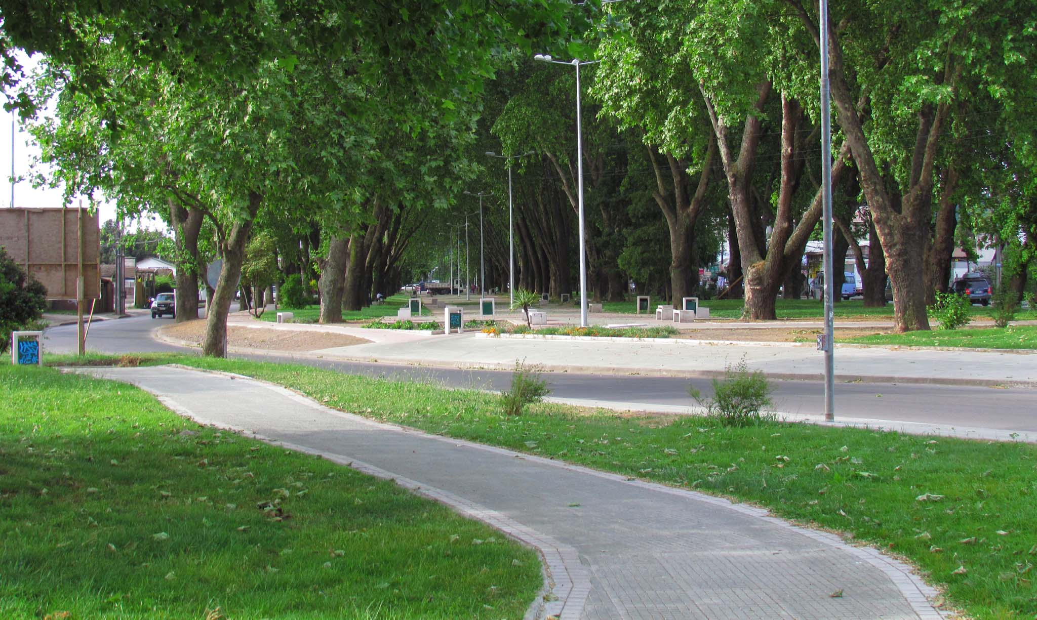 Curico alameda 2012